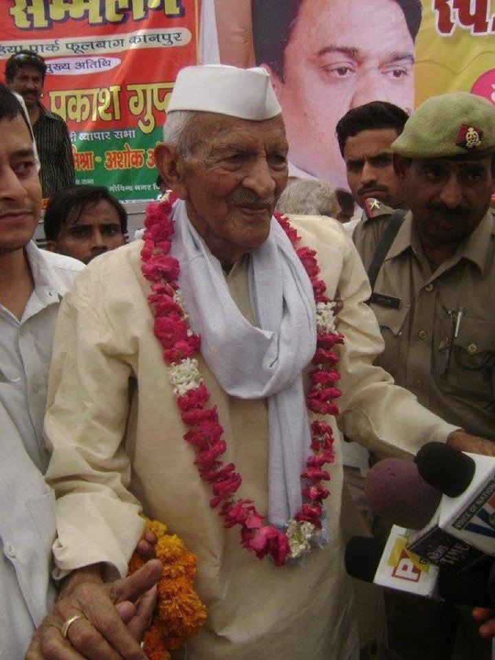 Chaudhary Harmohan Singh Yadav